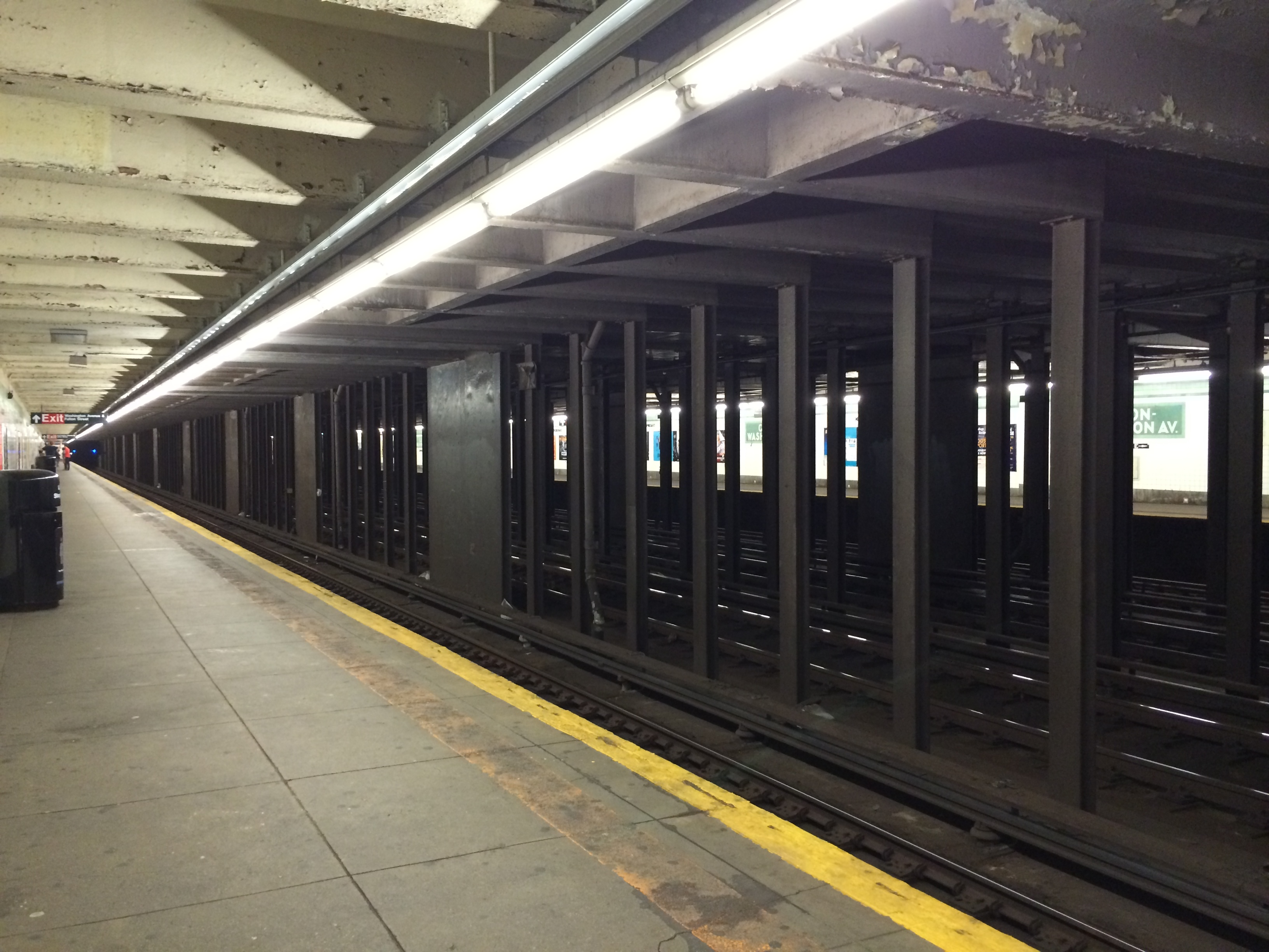 NYC subway